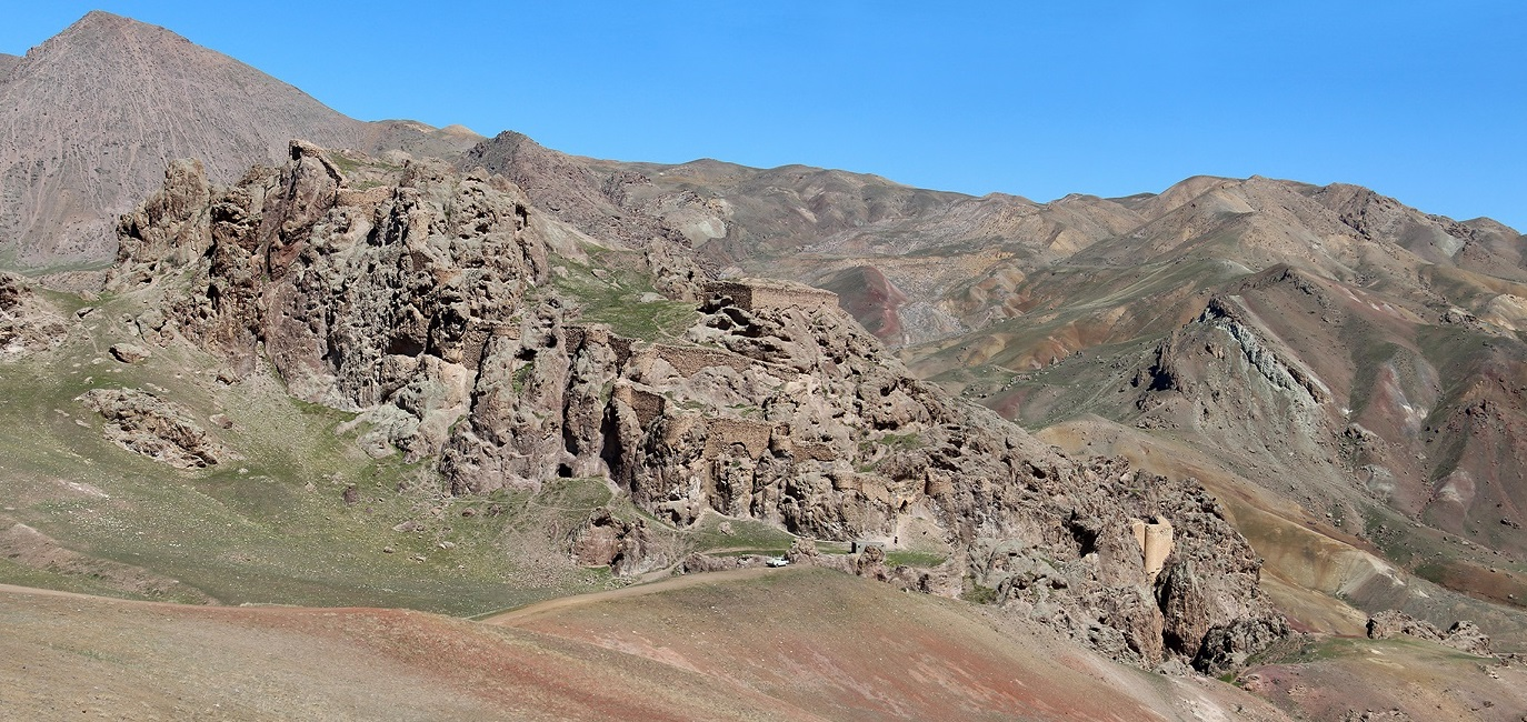 قیز قالاسی میانه